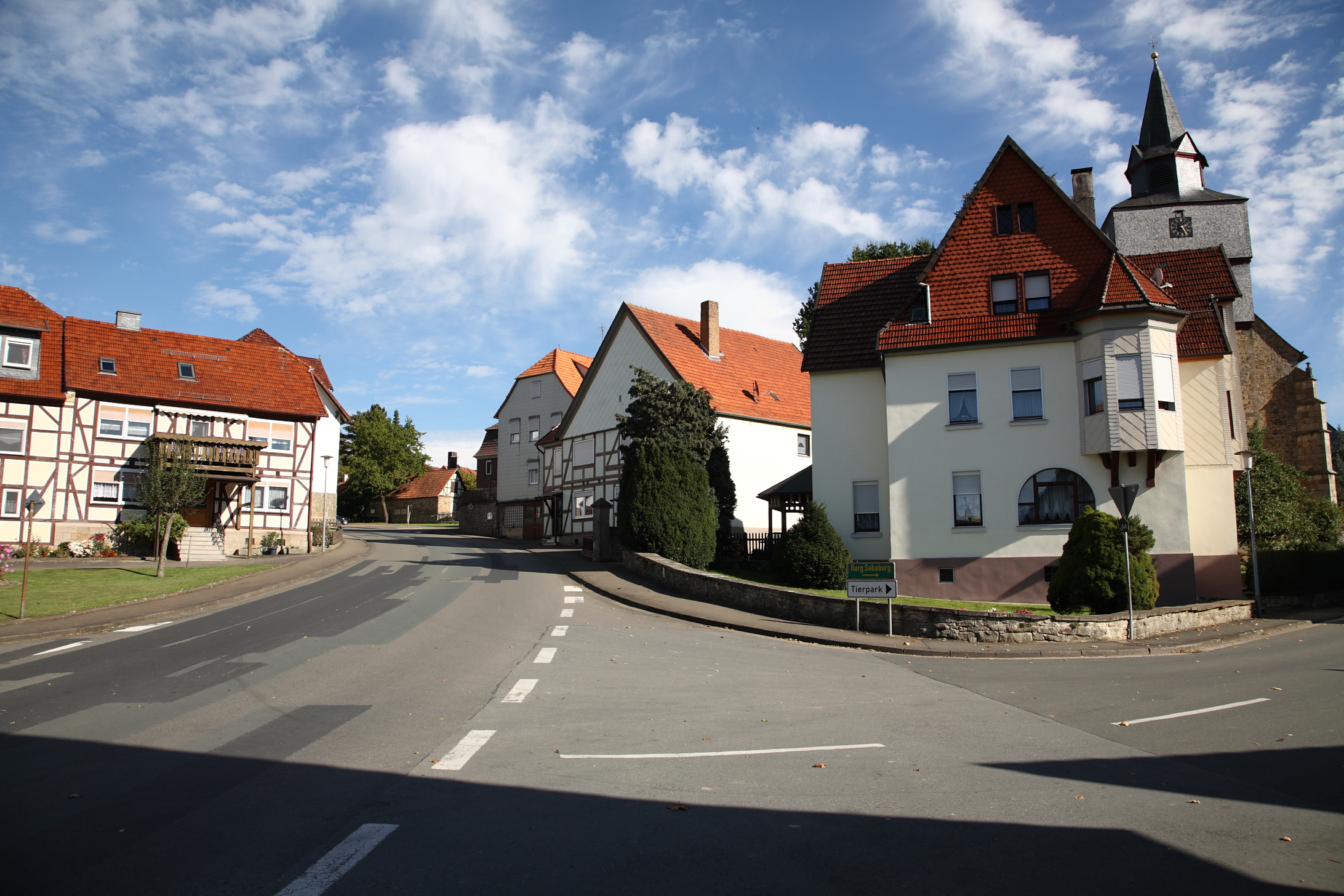 Eine Straßenkreuzung in Gottsbüren, links die L763 Richtung Gieselwerder, rechts die K55 Richtung Sababurg.